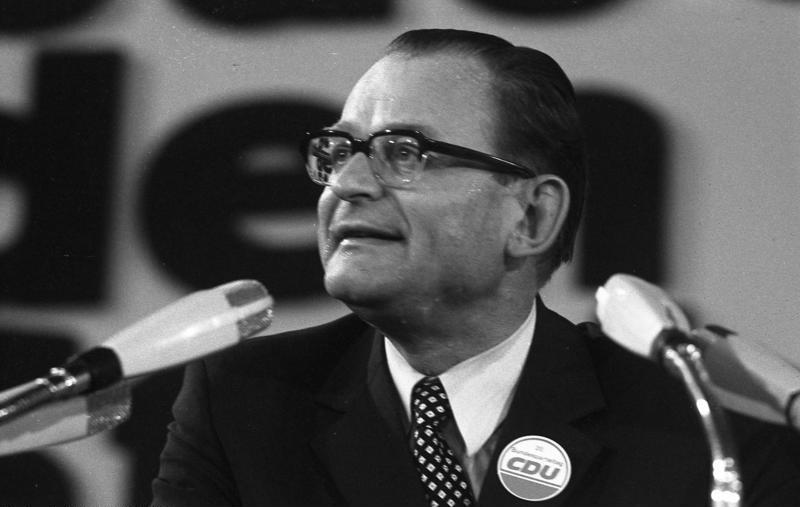 CDU-Parteitag 1972 in der Wiesbadener Rhein-Main-Halle. (Dr. Konrad Kraske) 9.-11.10.1972